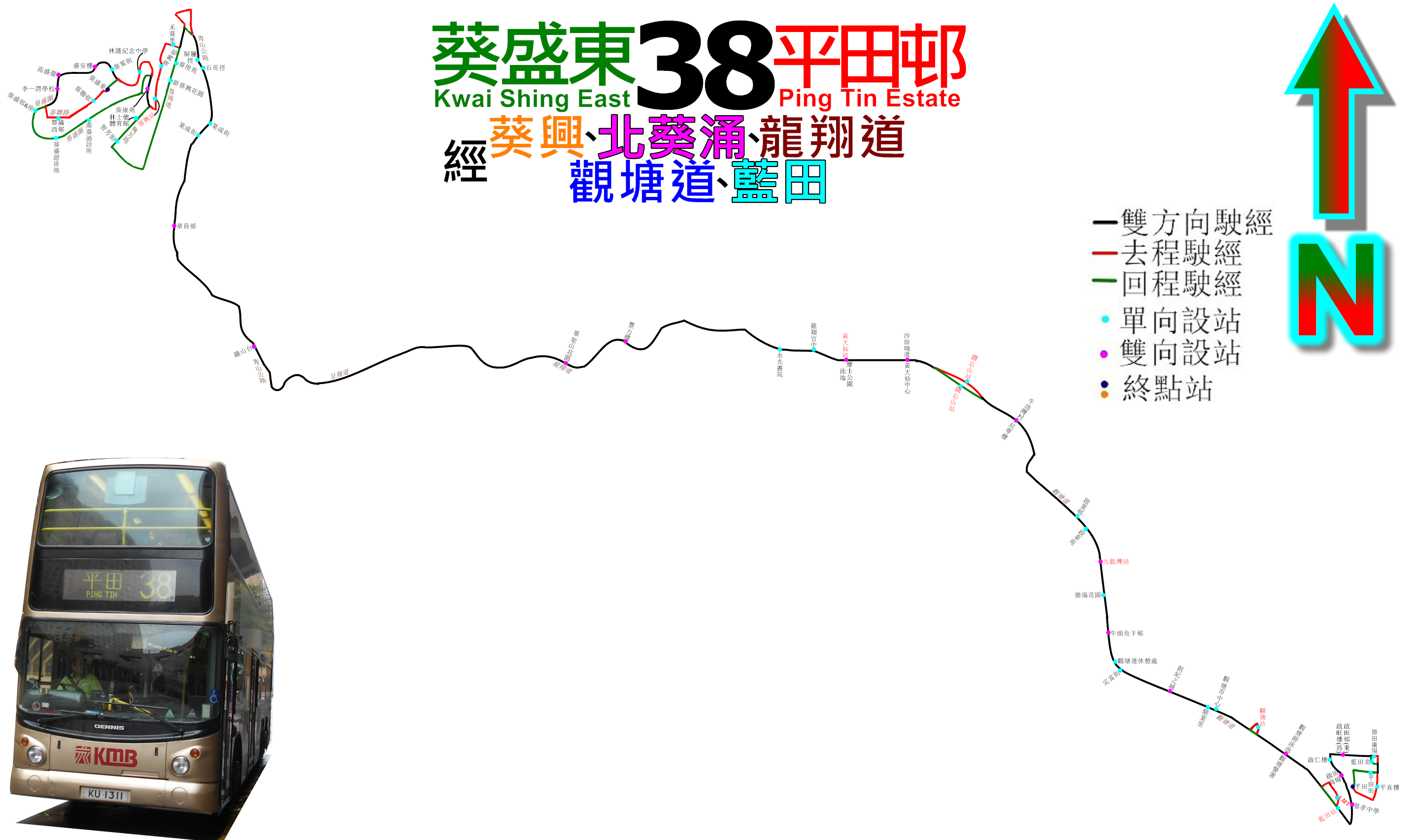 中文（香港）: 九巴38線的走線圖